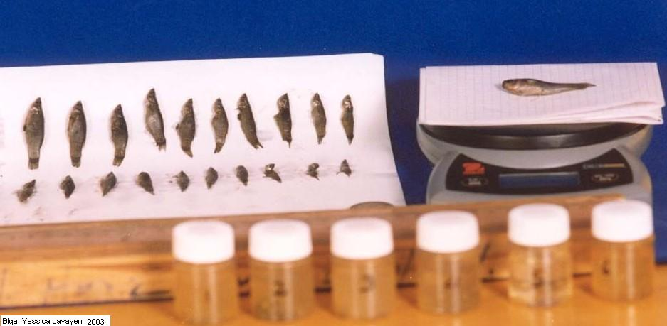 La imagen fur tomada cuando me disponia a pesar y medir los ejemplares de estos millonarios